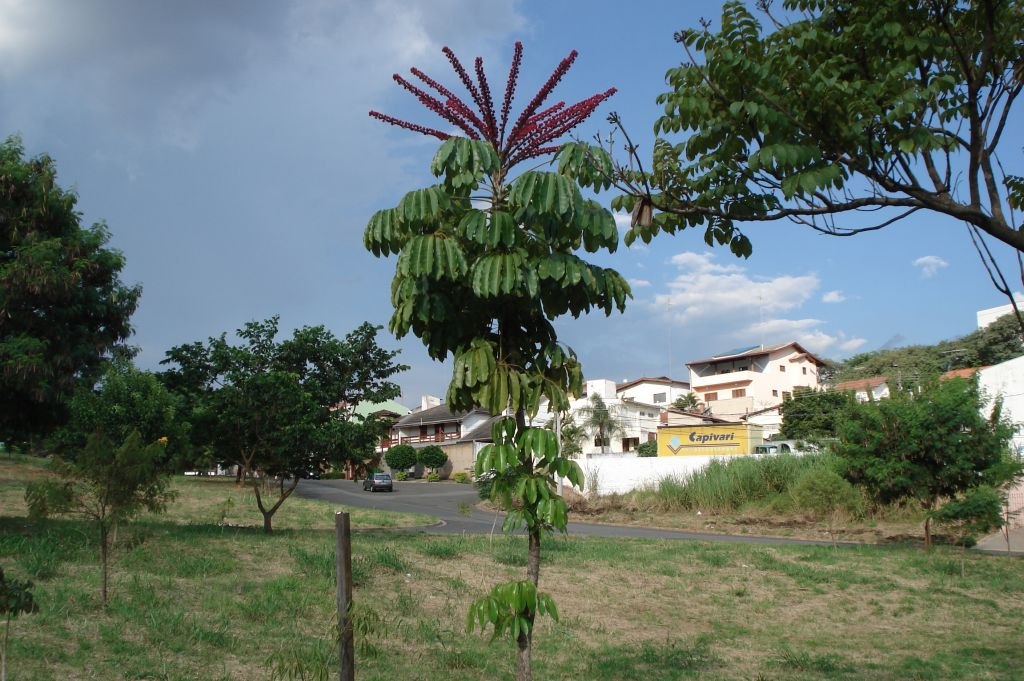 Bairro Jardim Pacaembu, Campinas, SP, Brasil